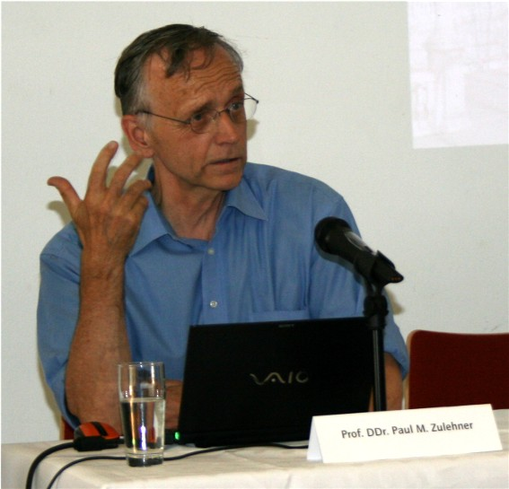 Paul M. Zulehner 2008 in der Kath. Landvolkshochschule Freckenhorst